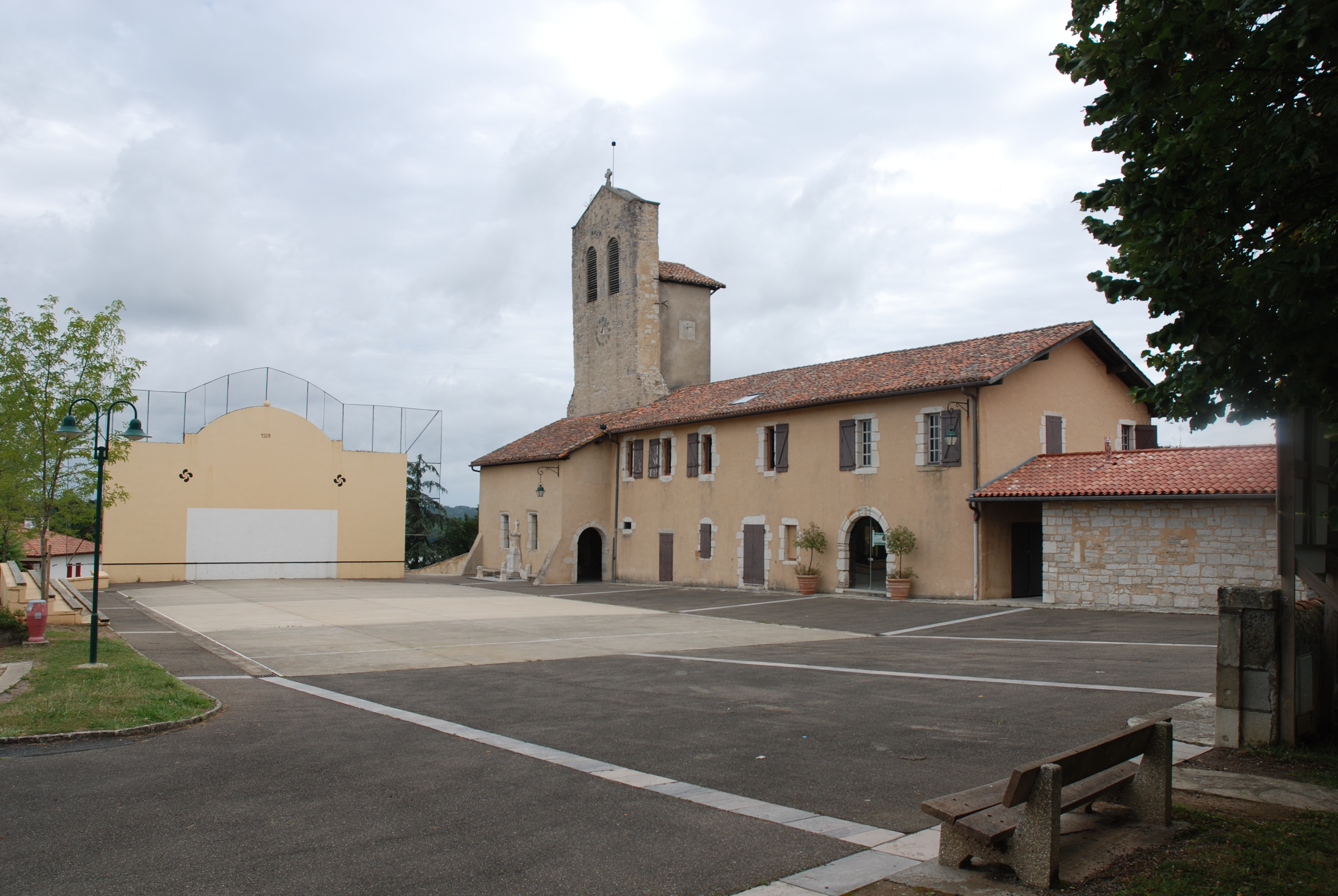 Lahonce, l'abbaye de chanoines de Prémontré, actuellement église paroissiale de l'Assomption-de-la-Bienheureuse-Vierge-Marie et mairie, et le fronton place libre.